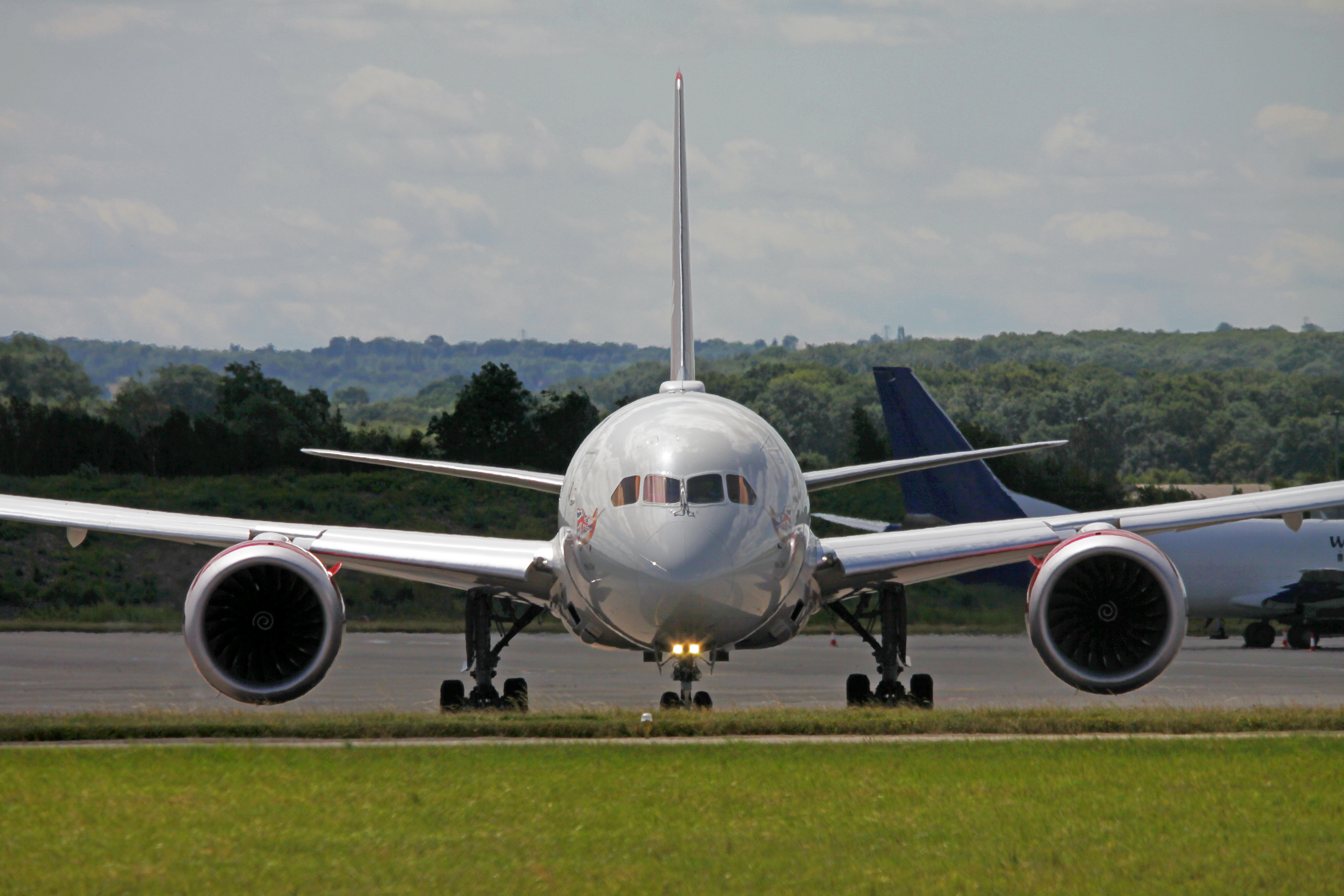 Taxiing at EMA.